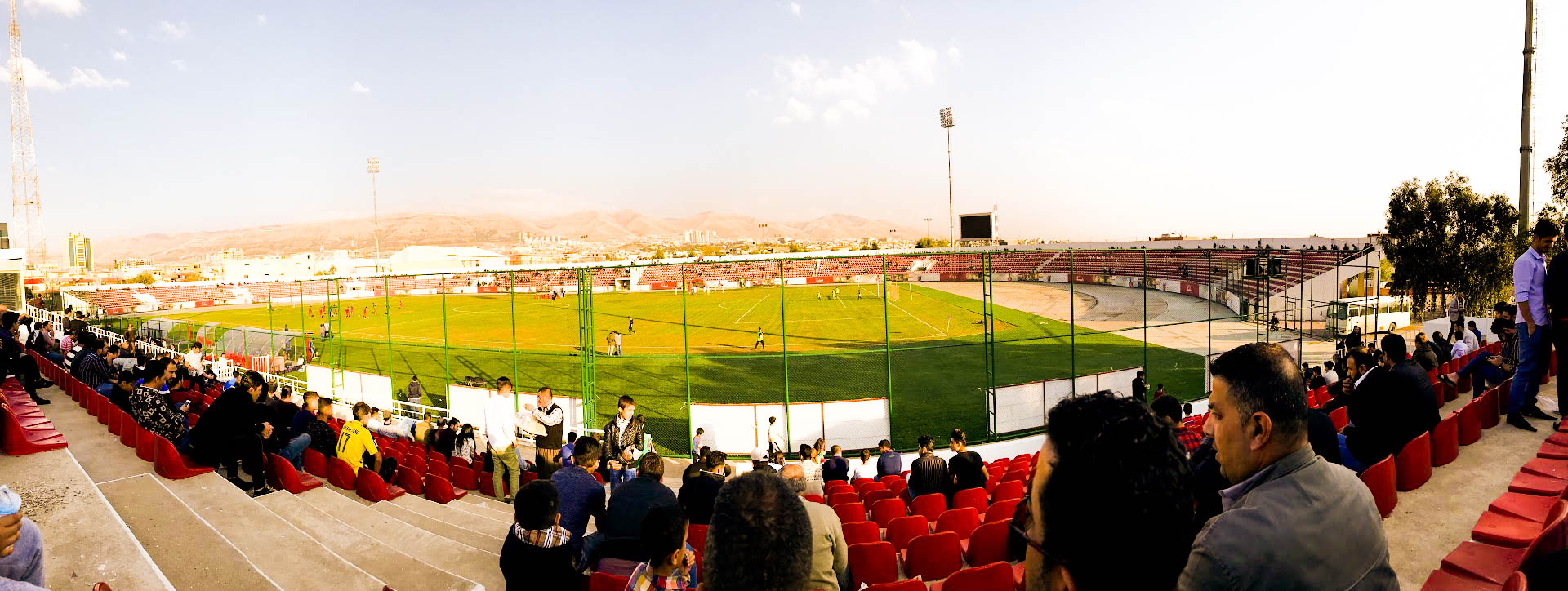 کوردی: یاریگای یانەی سلێمانی (مەلعەبەکە)